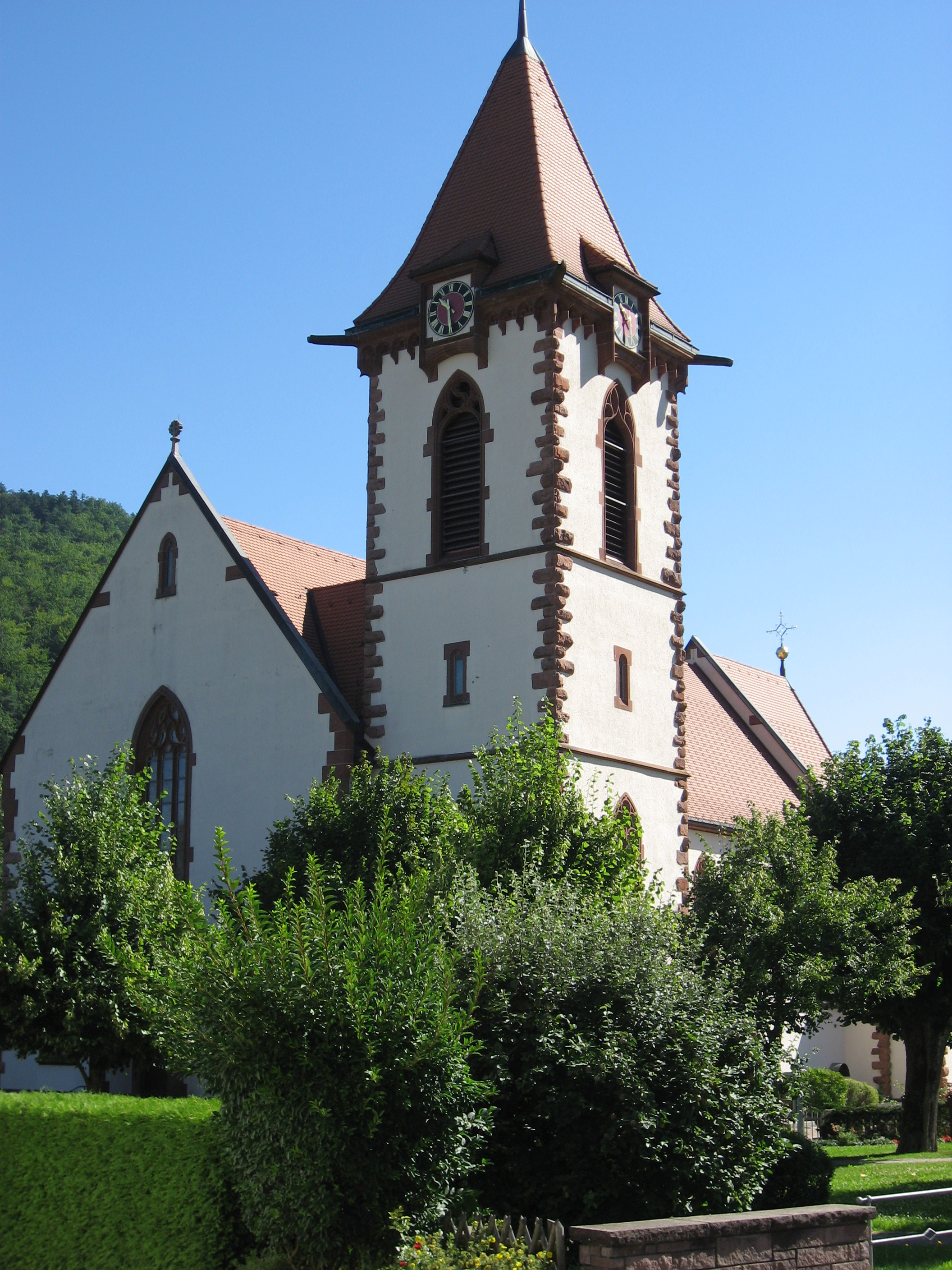 St. Blasius at Buchenbach, Baden-Württemberg, Germany